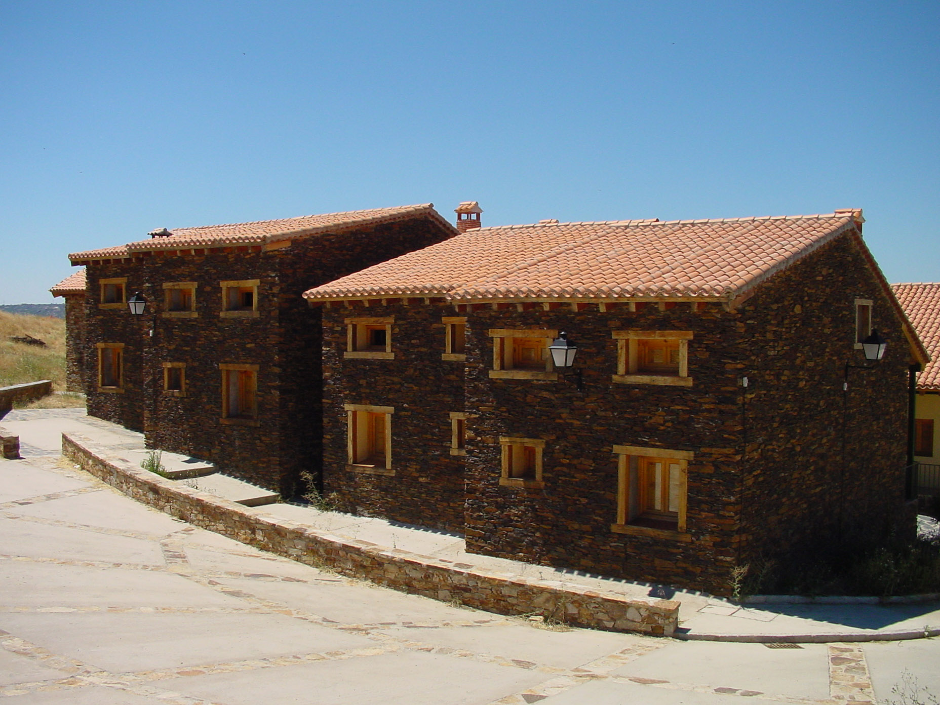 Casa de Cervera de Buitrago.